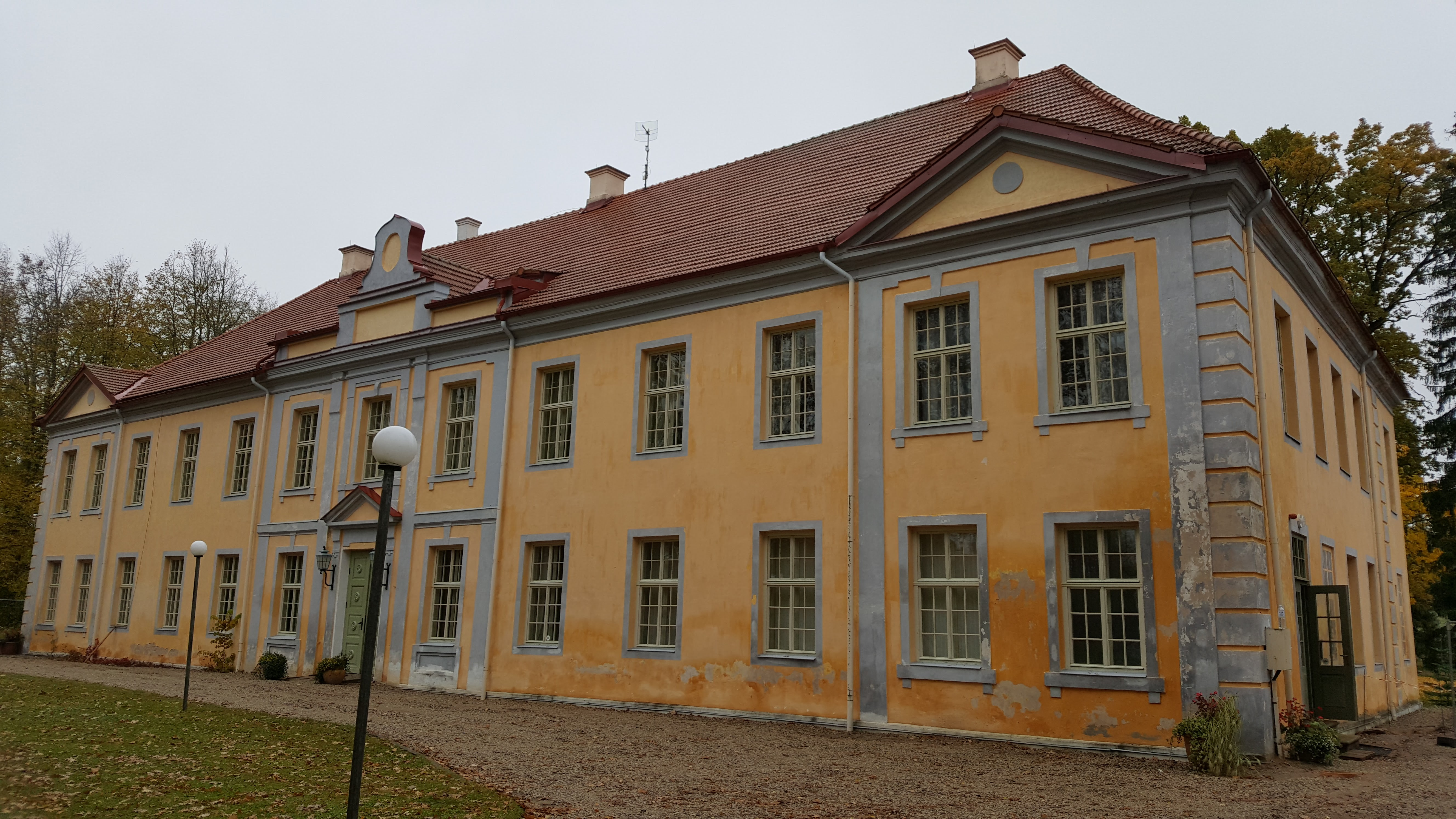 Veselauska mõisa peahoone 2017. aastal.